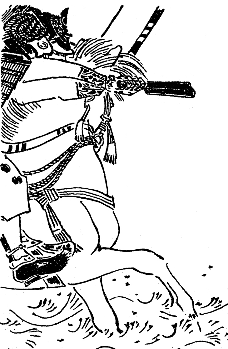 足利義兼、平安時代末期 - 鎌倉時代初期の武将。／江戸時代『前賢故実』より。画：菊池容斎。